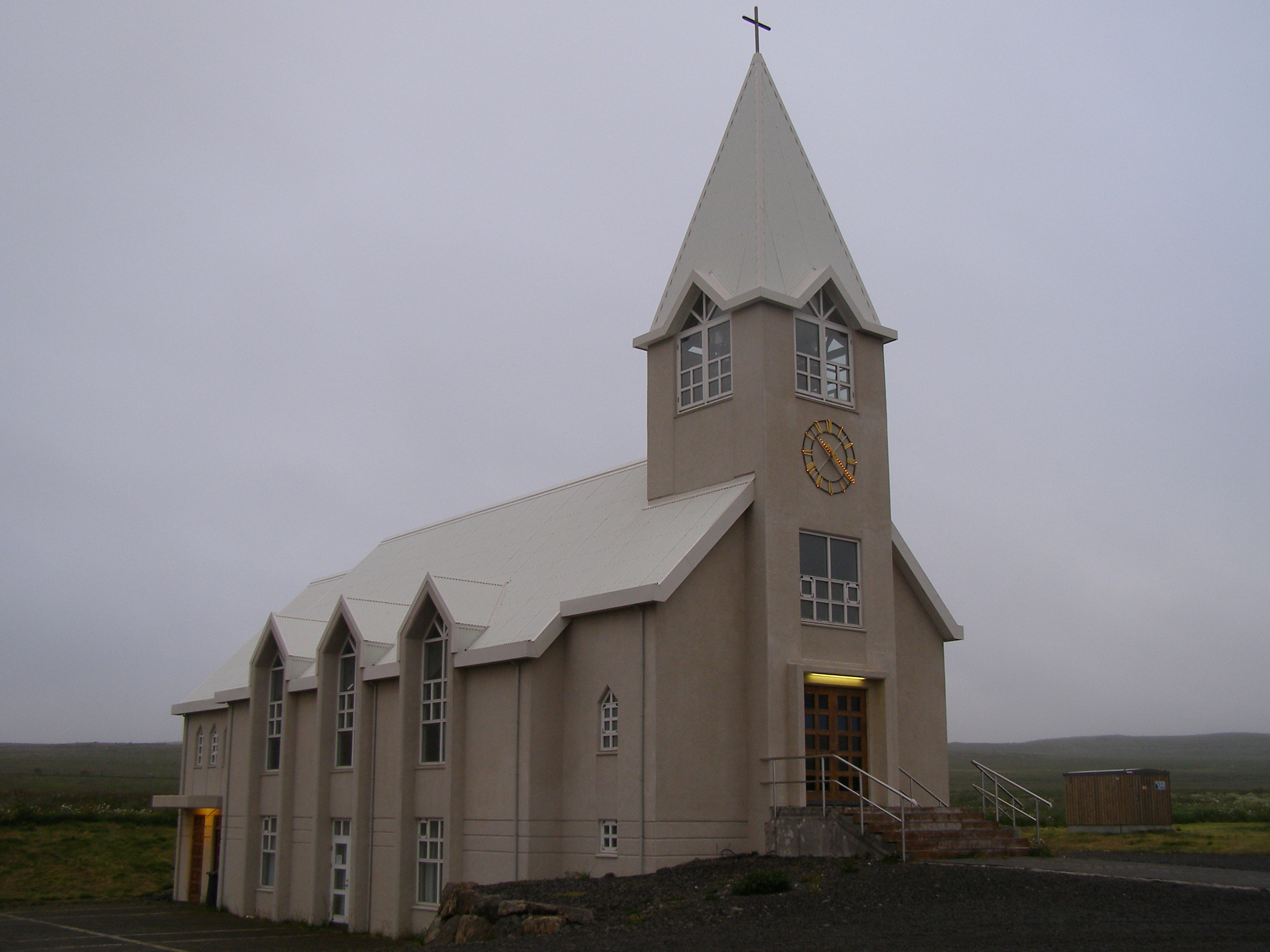 is/Þórshafnarkirkja er í Þórshafnarprestakalli í Þingeyjarprófastsdæmi.